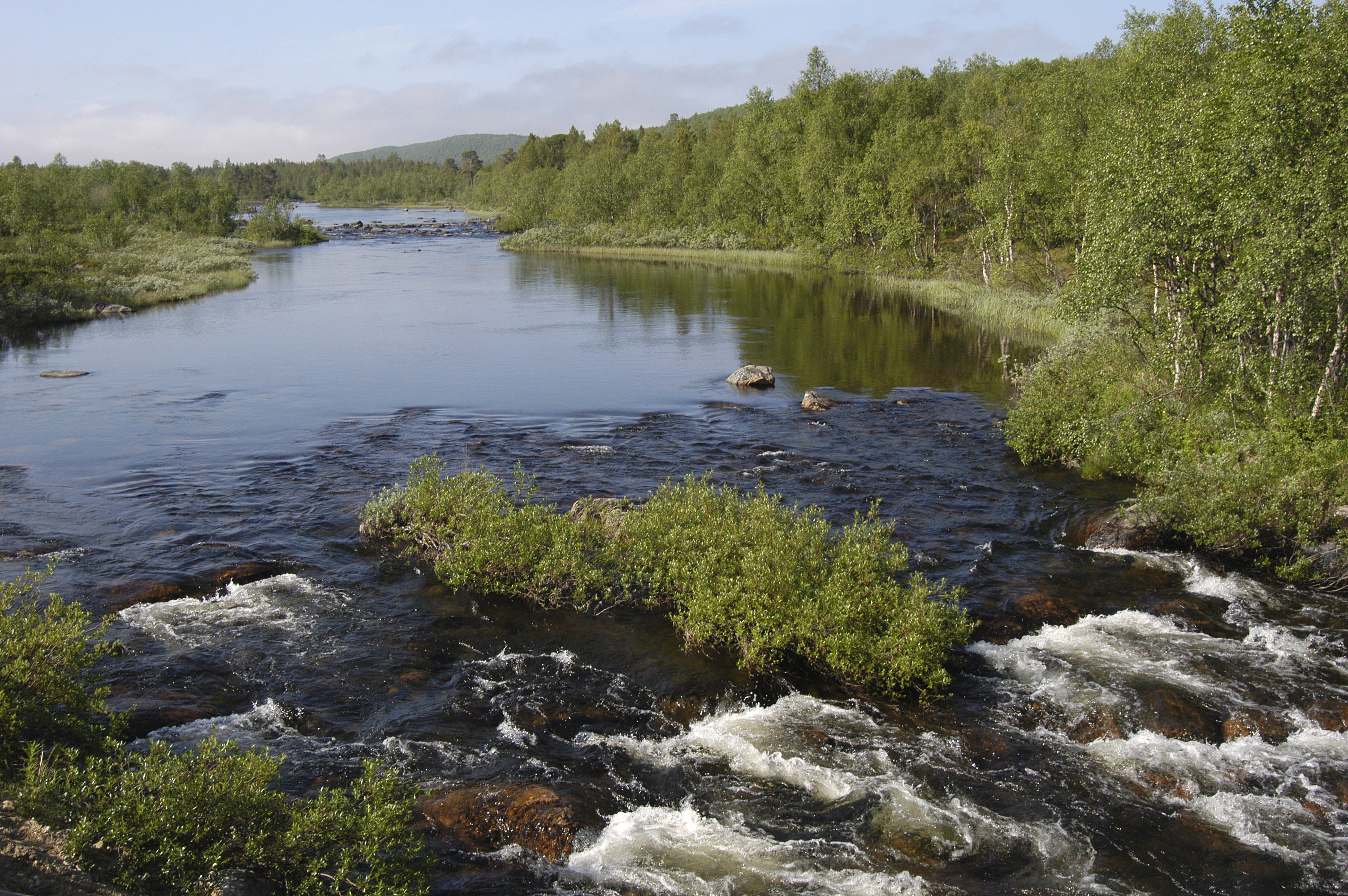 Peltojoki, july 2007